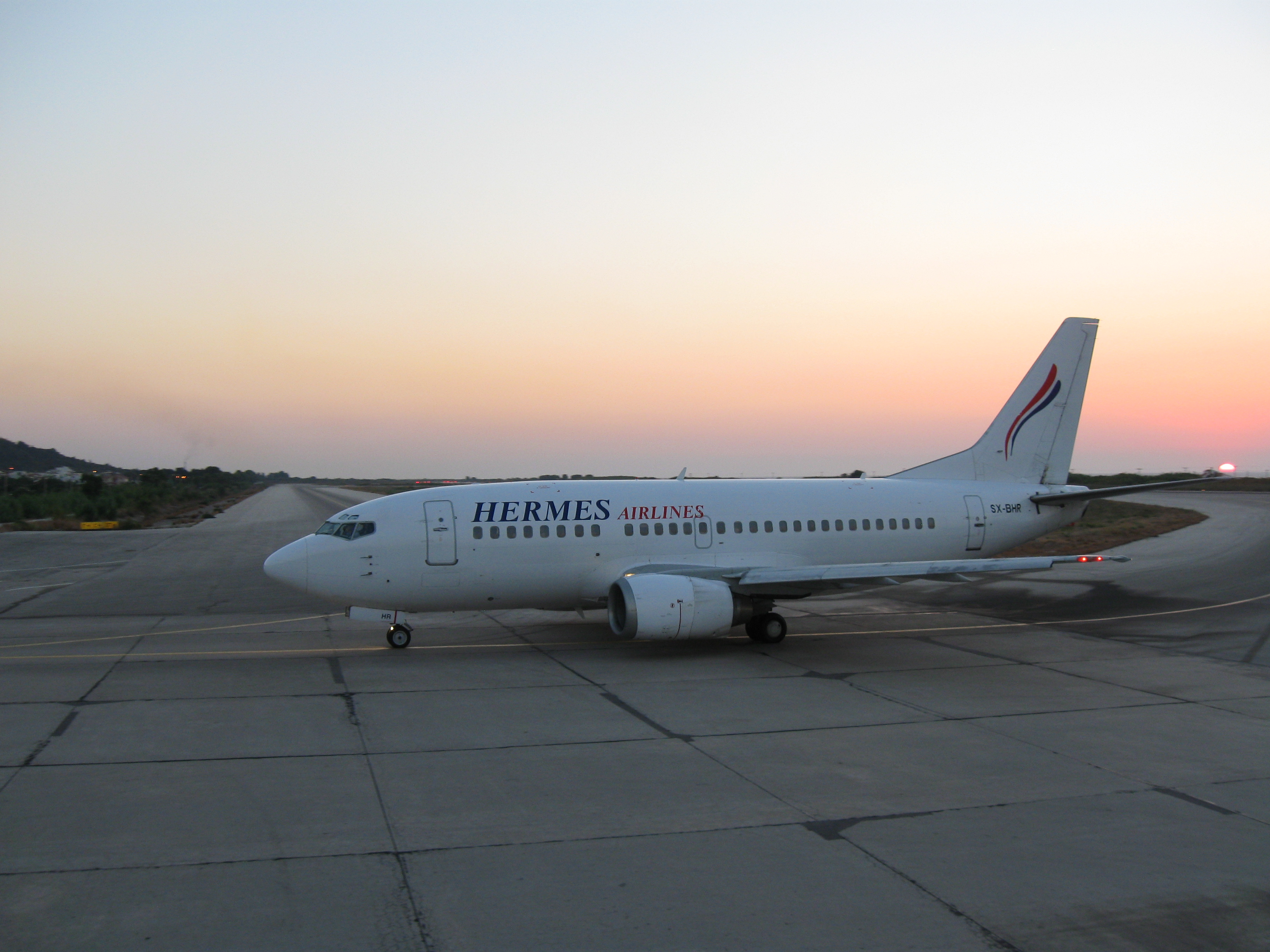 Am Abend des 10. August erreicht die Boeing 737-500 (SX-BHR) der Hermes Airlines den Flughafen von Rhodos. Zu diesem Zeitpunkt ist diese Maschine das einzige aktive Flugzeug in der Flotte.